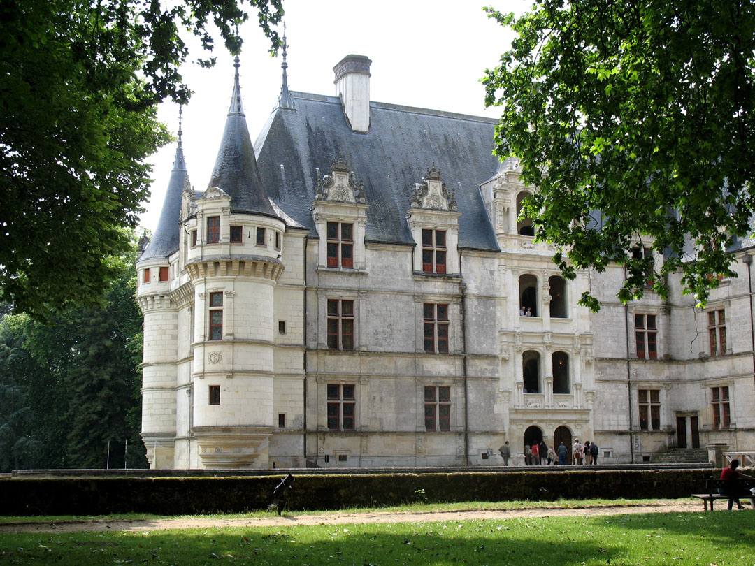 Entrée du Château d'Azay-le-Rideau, France